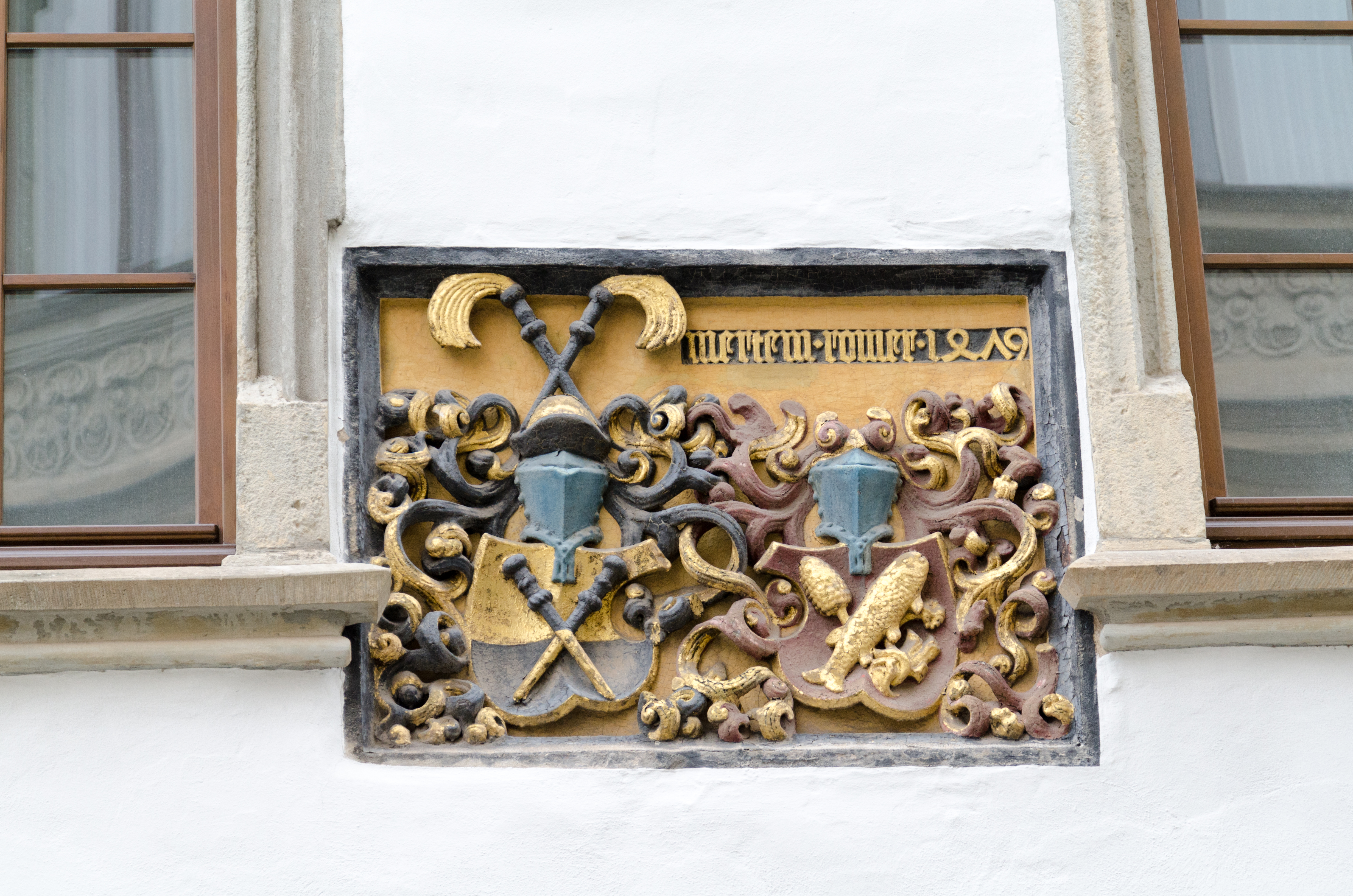 Zwickau, Hauptmarkt 8, Allianzwappen Martin Römer - Catharina Tretwein